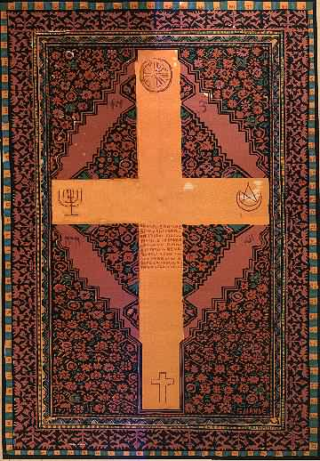 Incisione di Gabriele Mandel. Le religioni sono vie che portano ad un unico centro. Foto dall'originale (collezione di Nazzareno Venturi)